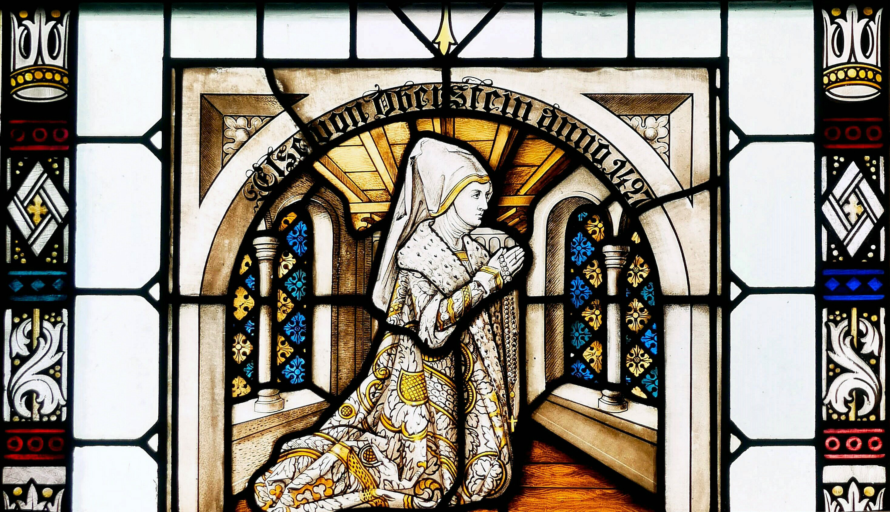 Spätgotische Glasmalerei